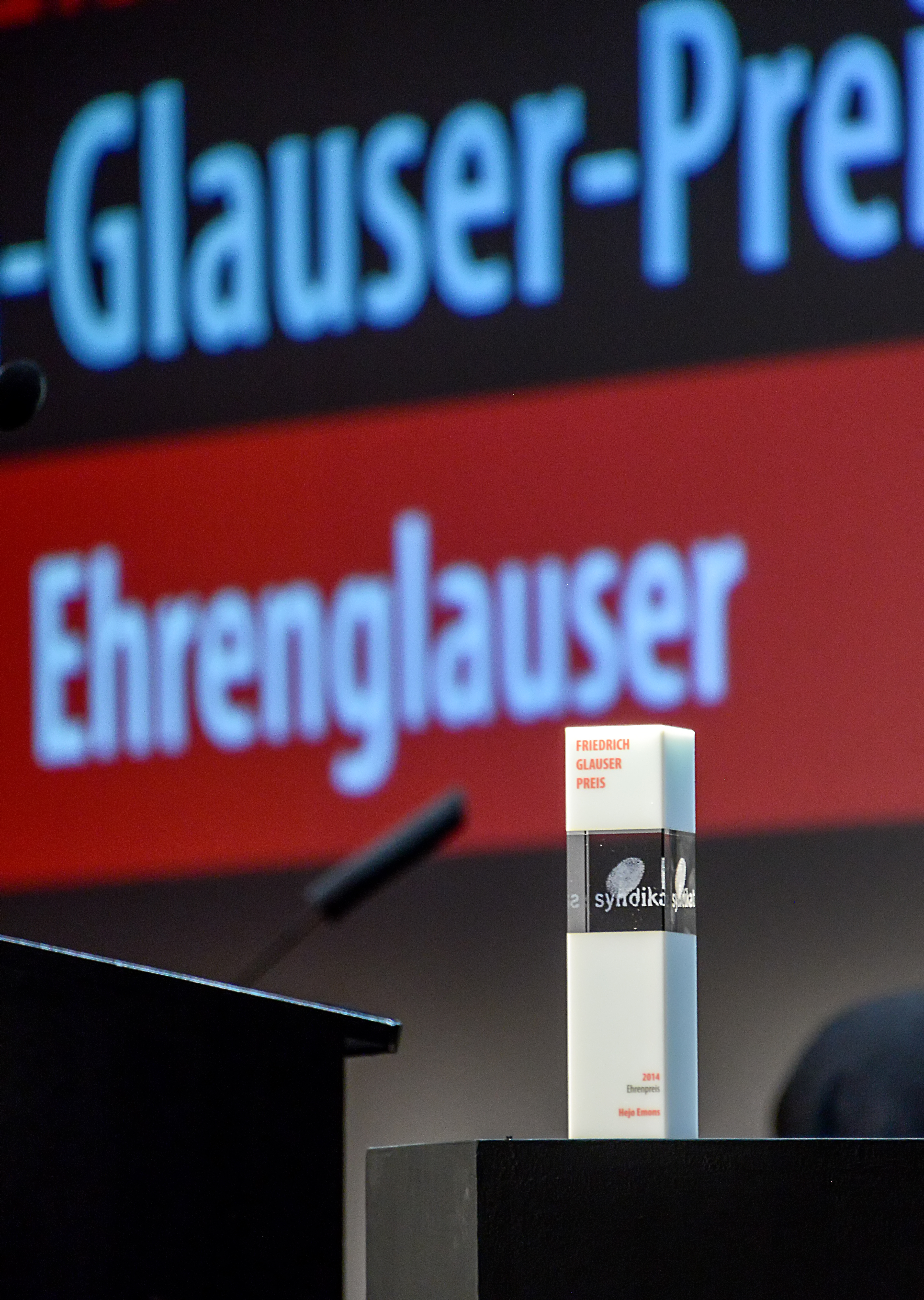 "Friedrich Glauser-Ehrenpreis"